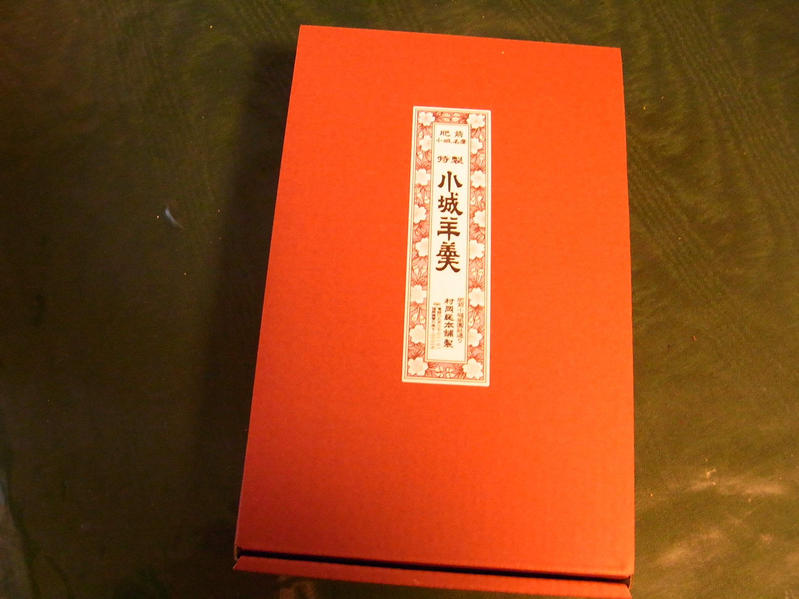 佐賀 村岡総本舗